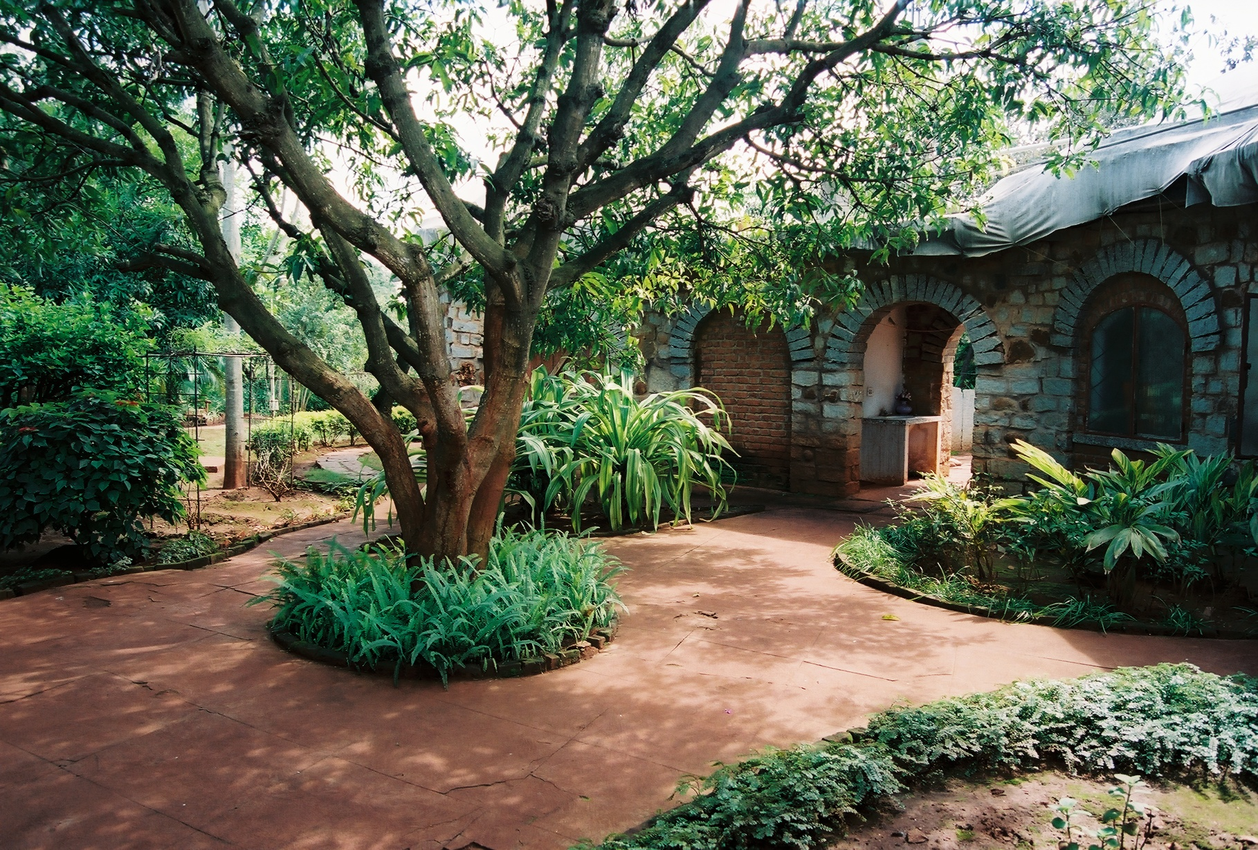 Gardens.